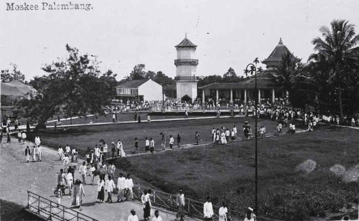 Foto. Veel mensen op het plein voor de Moskee Palembang